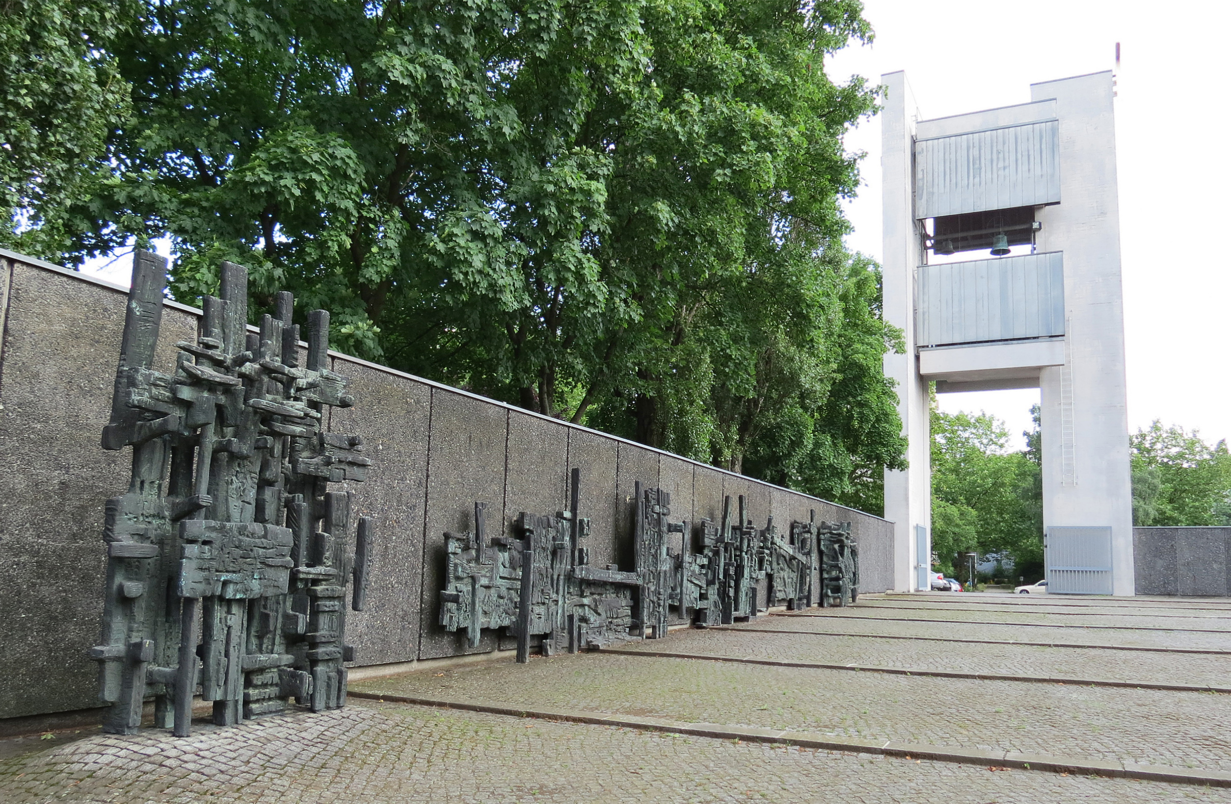 Maria Regina Martyrum Kreuzweg von Otto Herbert Hajek